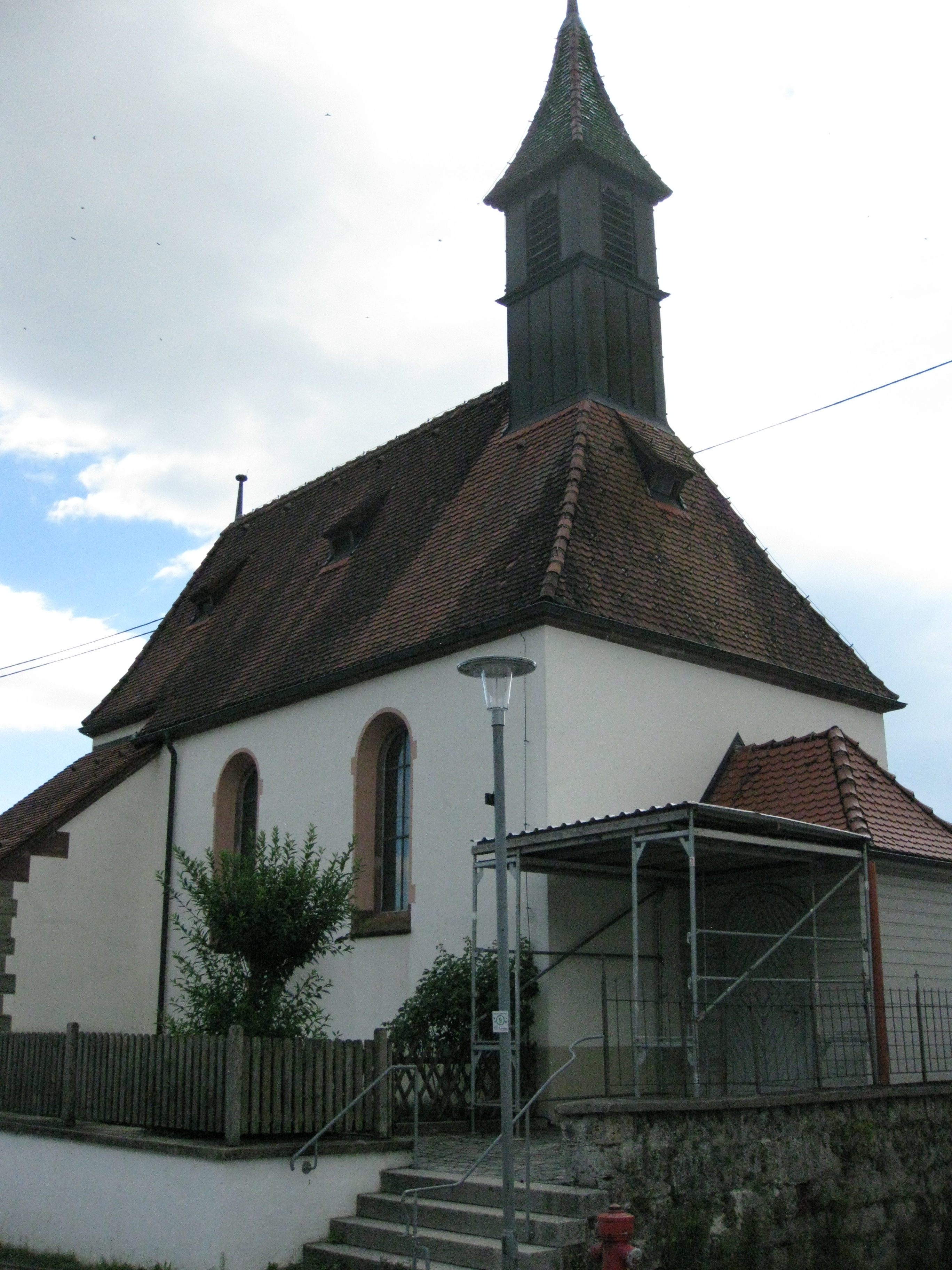 Nikolaus Kapelle Brunnadern (Ortsteil von Bonndorf im Schwarzwald)